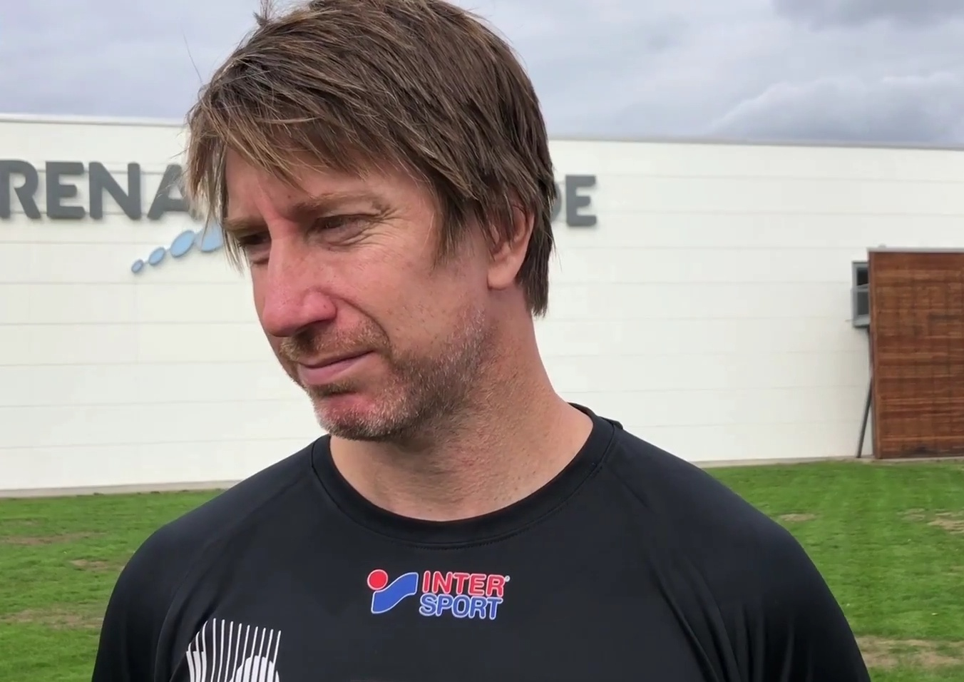 Jonas Wille utanför Arena Skövde